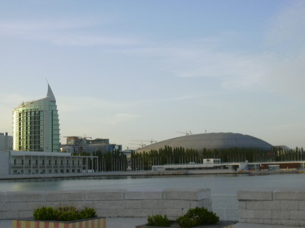 Parque das Nações, Lisboa. (WikiOlissipo 2006)